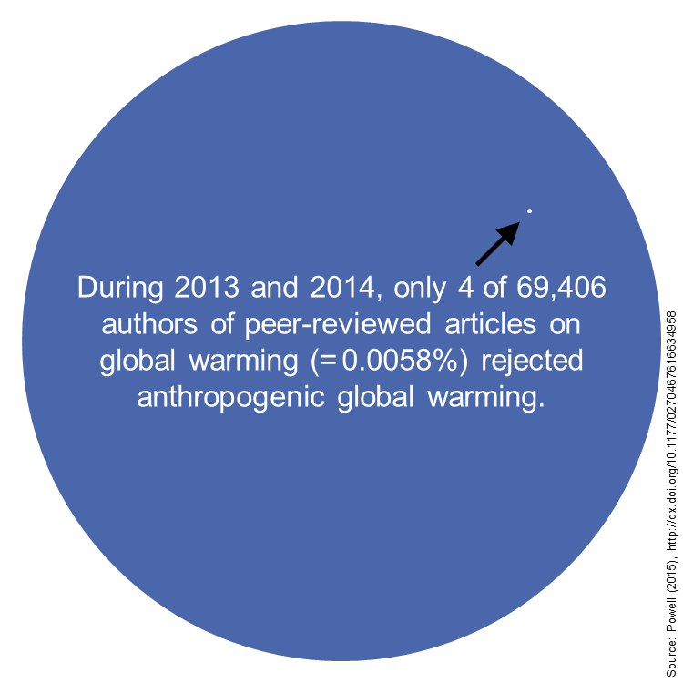 Ablehnung einer anthropogenen Klimaerwärmung in wissenschaftlichen Fachzeitschriften.